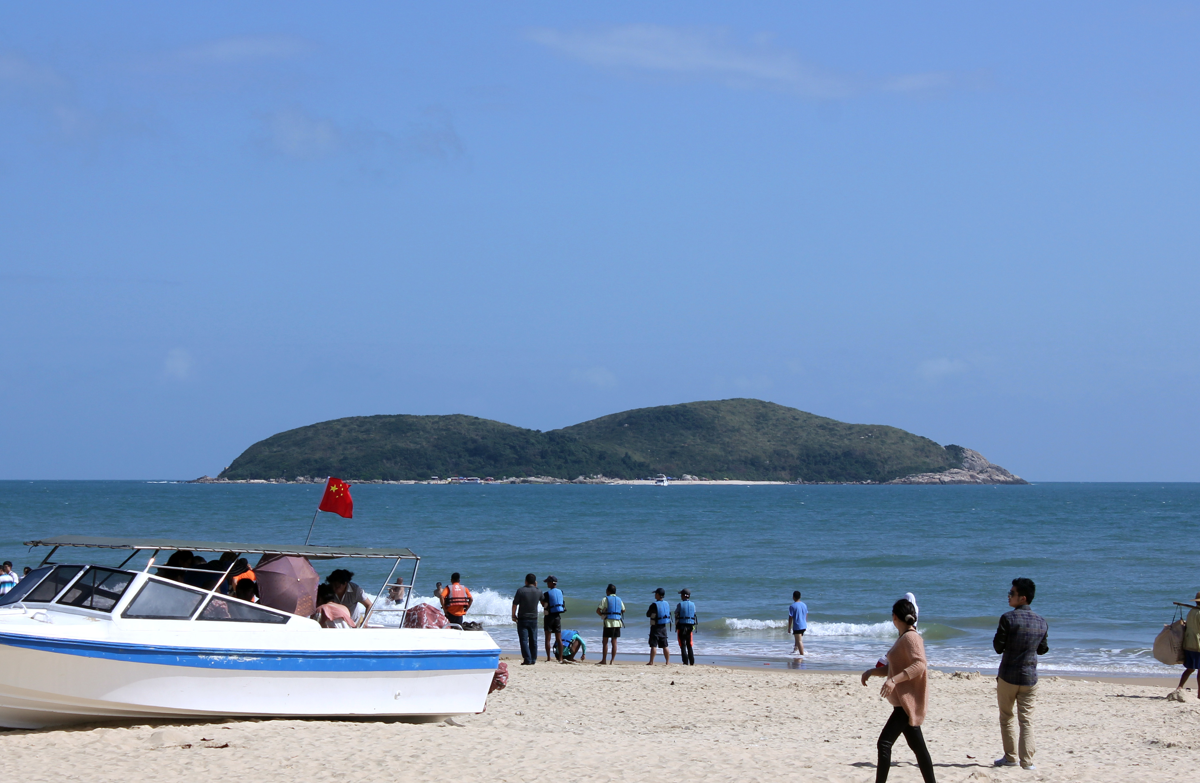 海南省万宁市加井岛。